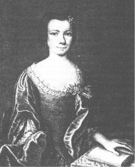 Portrait der deutschen Schriftstellerin Johanna Charlotte Unzer.